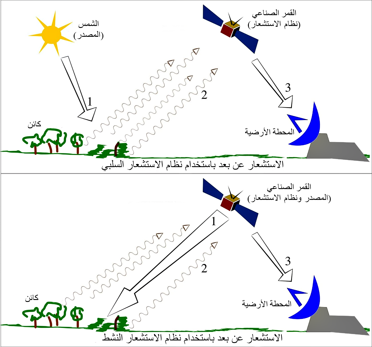 توضيح الاستشعار عن بعد